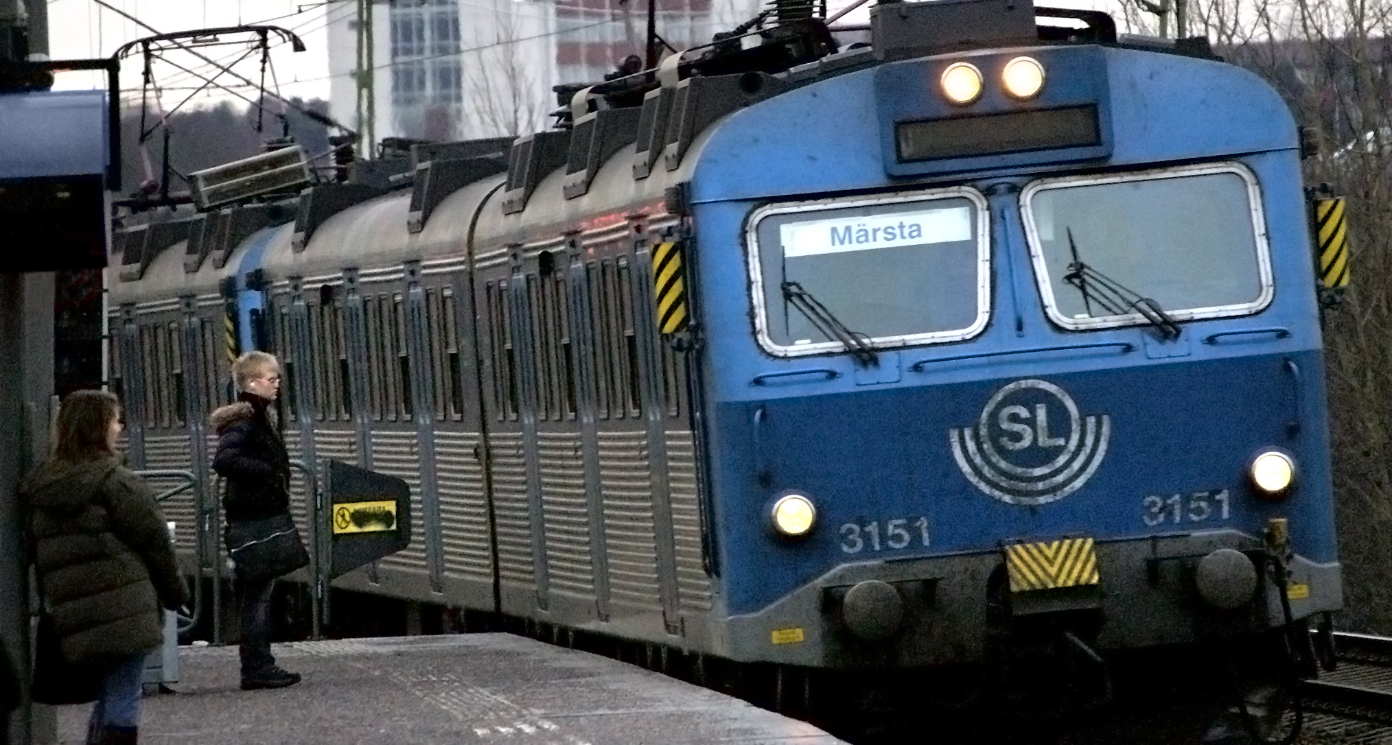 X10 Commuter Train arrives at Årstaberg, Stockholm.